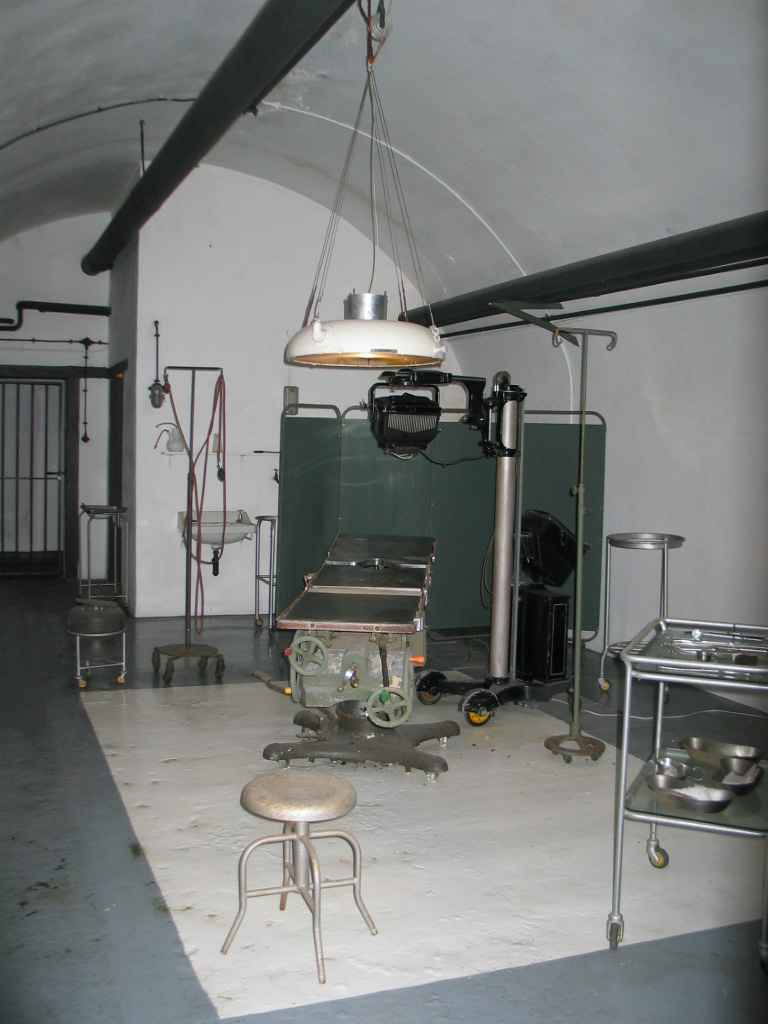 Operatiekamer German Underground Hospital op Jersey. De foto is gemaakt op 25 augustus 2004 door H. de Vegt.